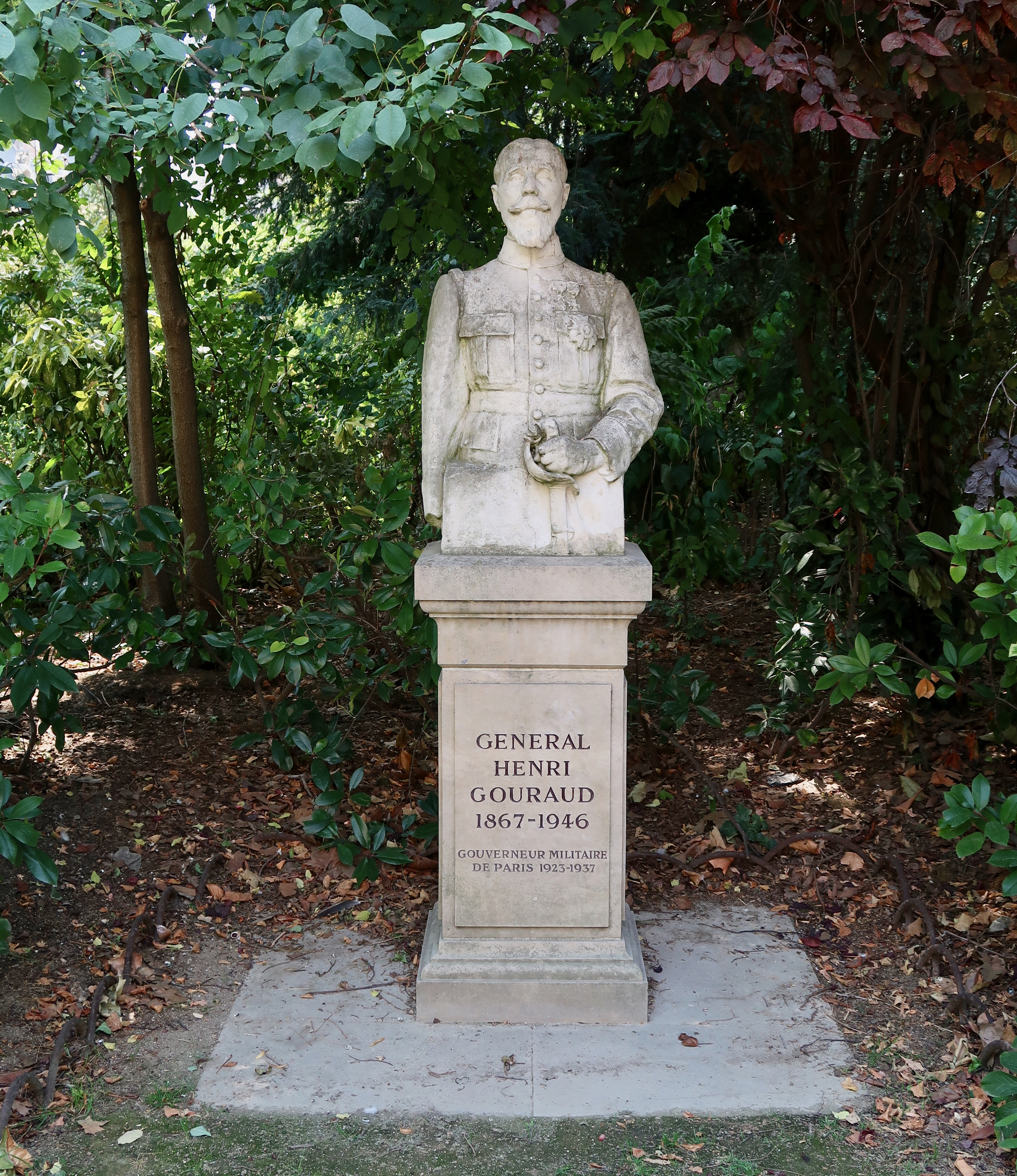 Monument dédié à Henri Gouraud dans le square d'Ajaccio (Paris, 7e).